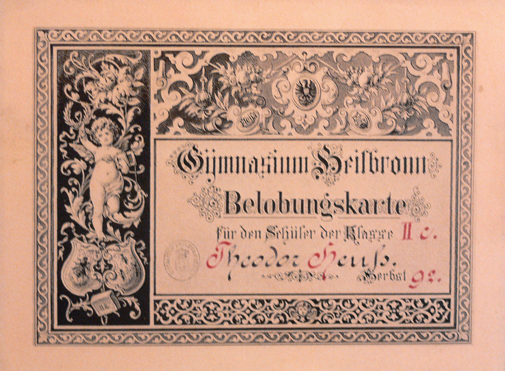 Belobungskarte für den Schüler Theodor Heuss, Heilbronn 1892